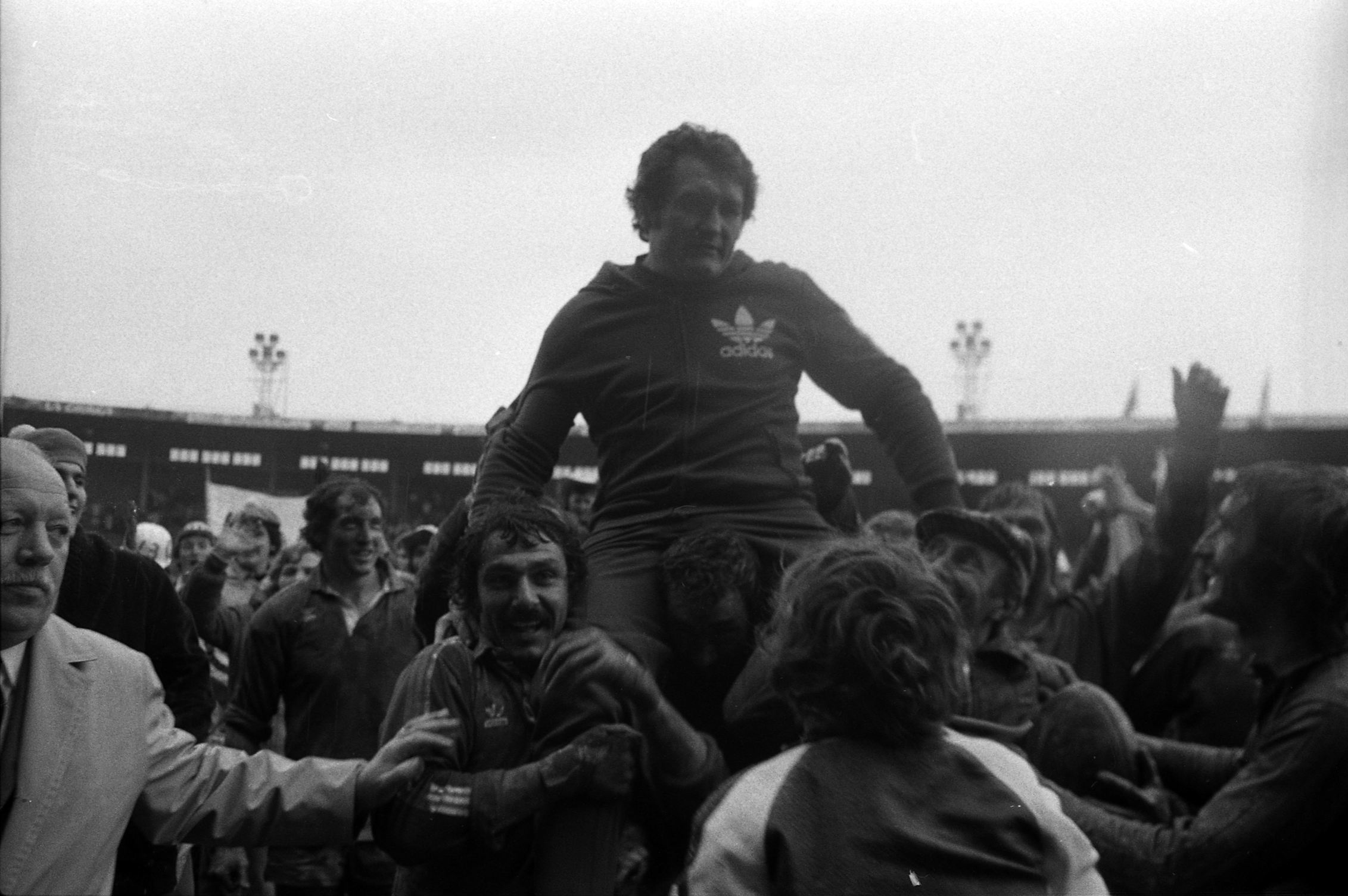 Stadium municipal de Toulouse, 1bis allées Gabriel-Biénès. 11 mai 1975. Plan rapproché sur Georges Aillières (entraineur du Toulouse Olympique XIII) porté en triomphe sur les épaules des joueurs champions de France (vue de face). Cliché pris lors de la finale du championnat de France de rugby à XIII où l'équipe du Toulouse Olympique XIII rencontre l'équipe de l'AS Saint-Estève.